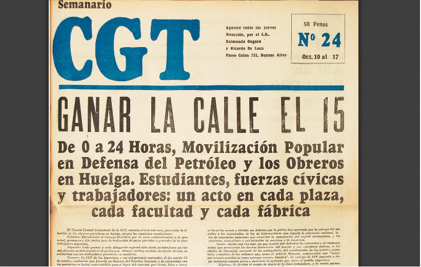 Semanario de divulgacion publica.